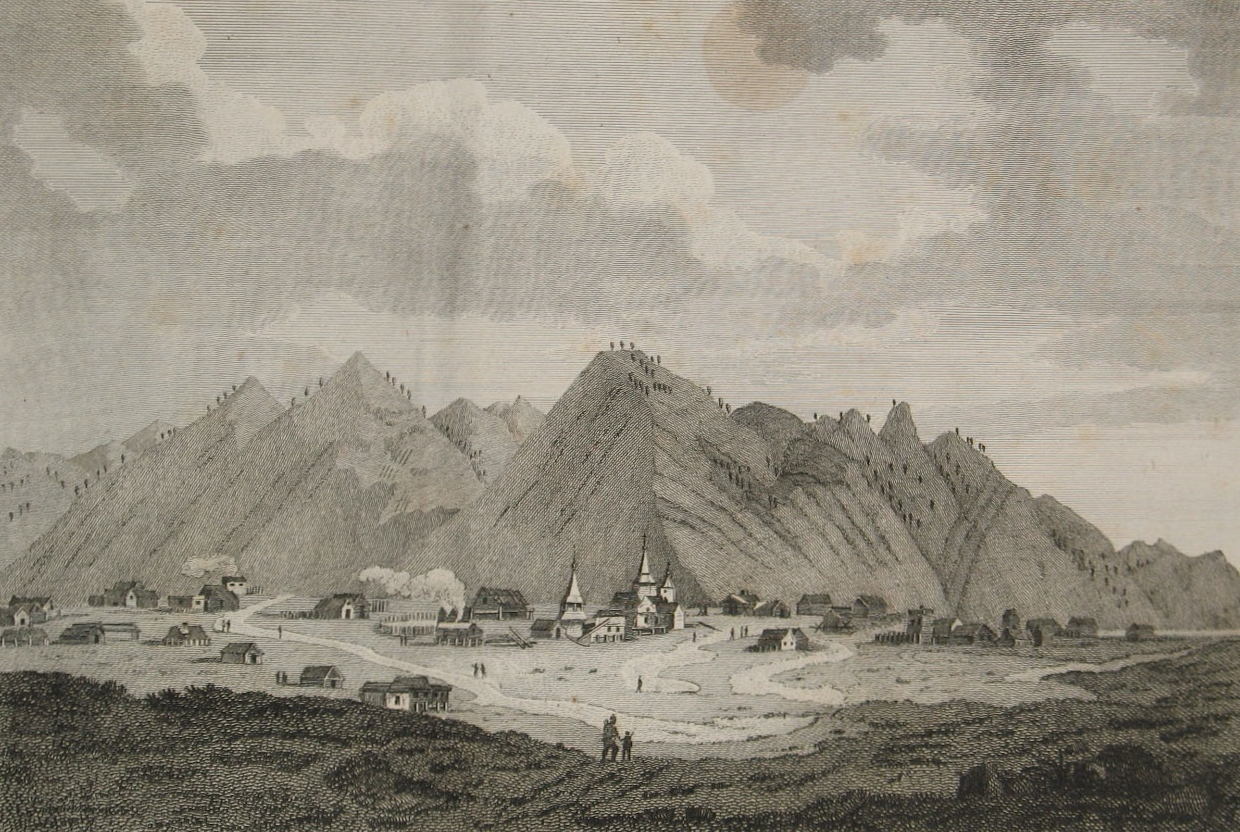 Иллюстрация французского издания Voyage fait par ordre de l'impératrice de Russie Catherine II, dans le Nord de la Russie Asiatique, dans la Mer Glaciale, dans la Mer d'Anadyr, et sur les côtes de l'Amérique, depuis 1785 jusqu'en 1794, par le Commodore Billings. Париж, 1802 год.